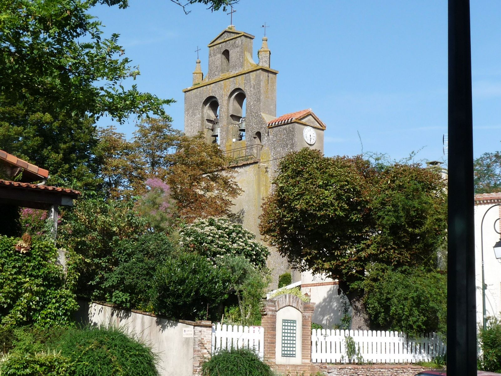 Eglise de Montgaillard-Lauragais, Haute-Garonne, France